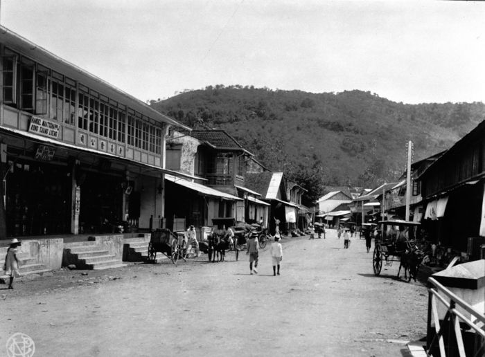 Foto. Straatgezicht in de Chinese wijk